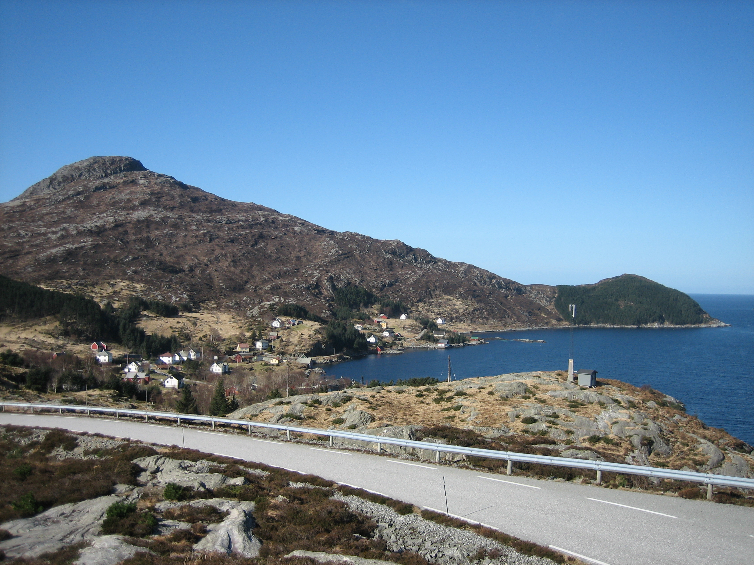 Husevåg sett fra Stegane